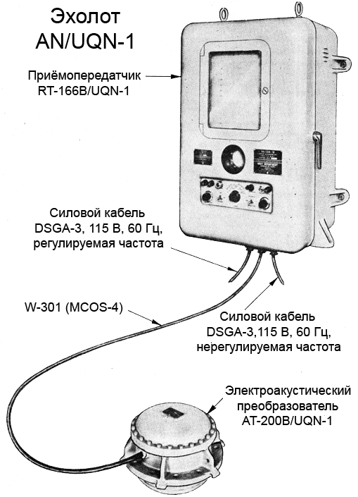 Общий вид и составные части американского эхолота AN/UQN-1